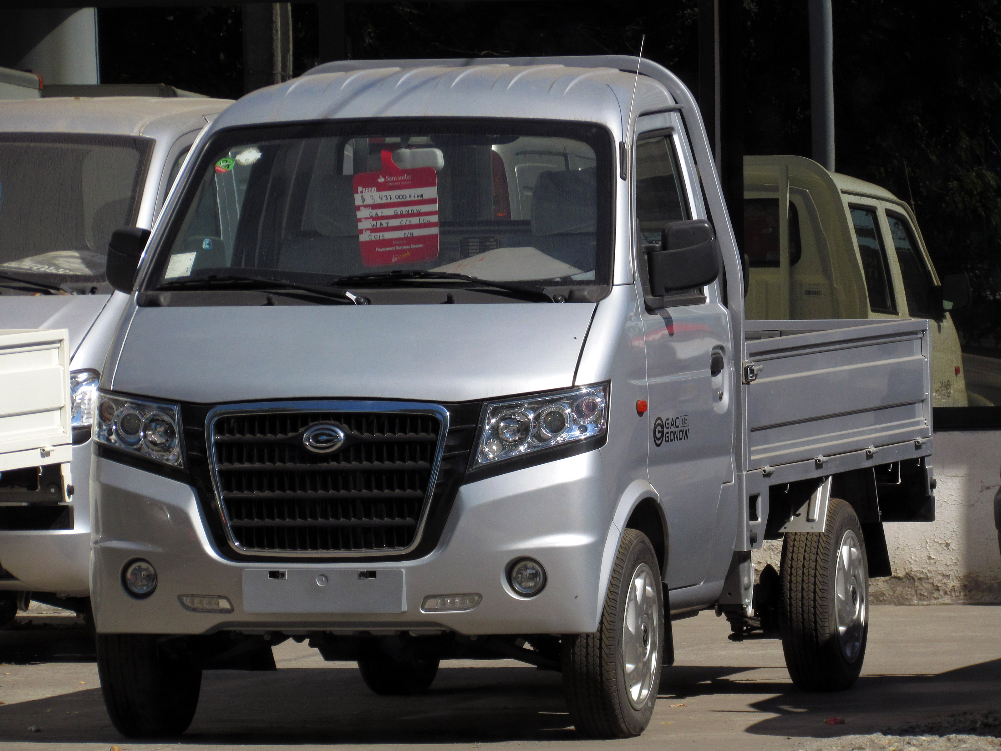 GAC Gonow Way 1000 2015